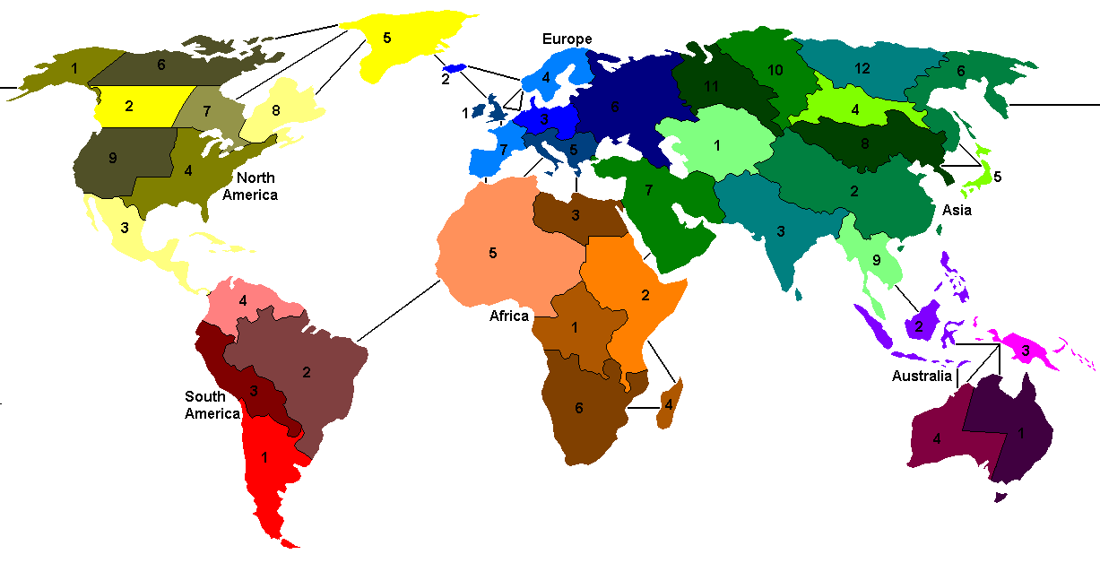 Risk map in Wikipedia.